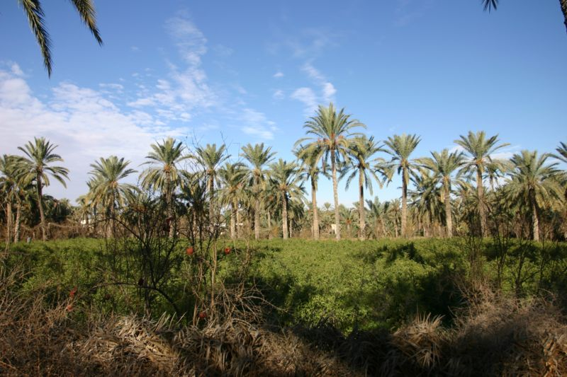 Photographie personnelle prise en décembre 2004 de la palmeraie dans l'oasis de Gabès. Au premier plan on aperçoit un grenadier, au deuxième plan un champ d'arbustes à henné et à l'arrière-plan une ligne de palmiers-dattiers.